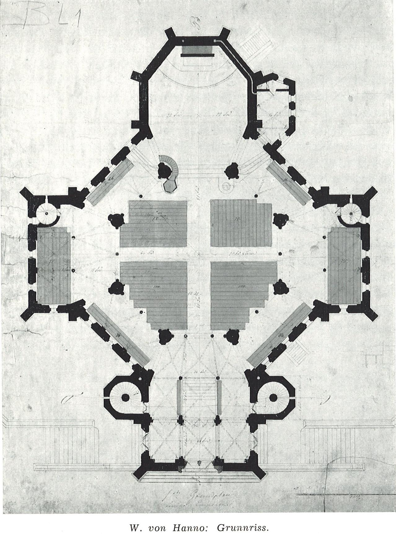 VonHanno-Grunnriss